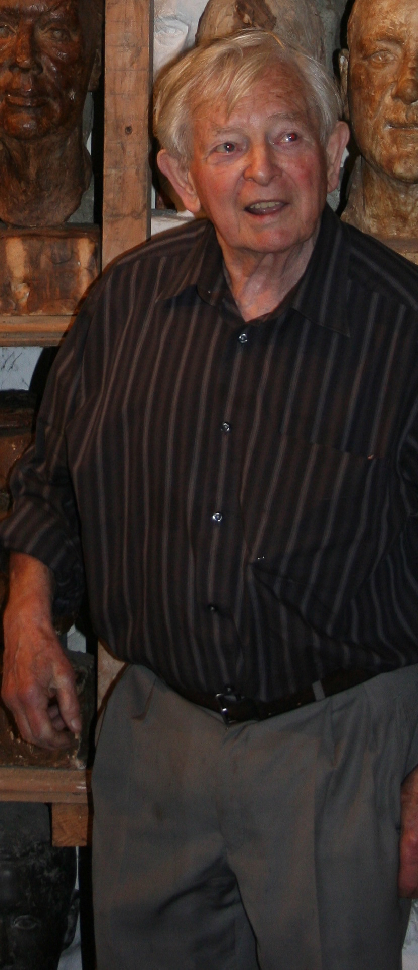 Schweizer Bildhauer, Zeichner und Grafiker Rolf Brem